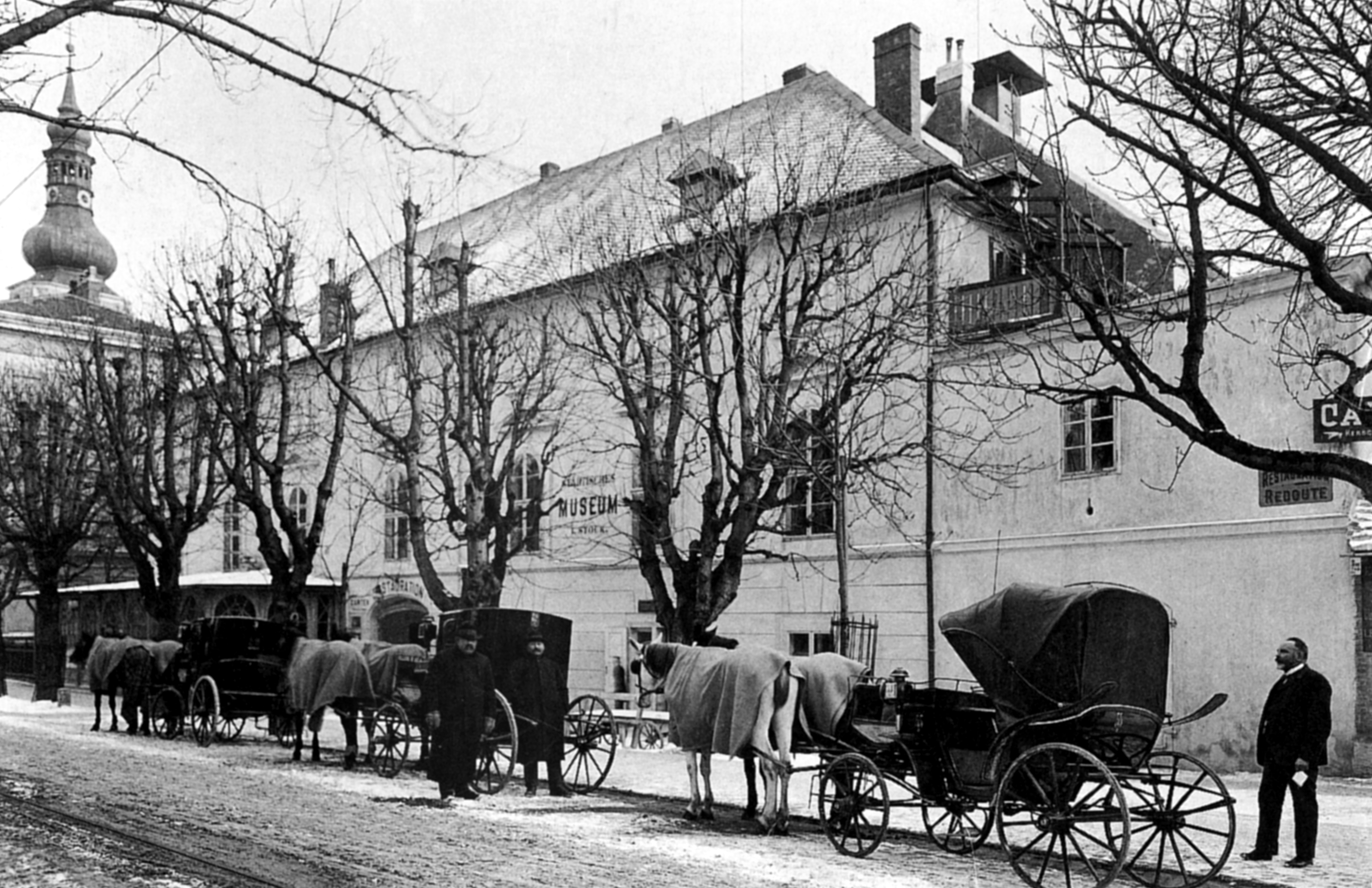 Baden bei Wien, Redoutengebäude